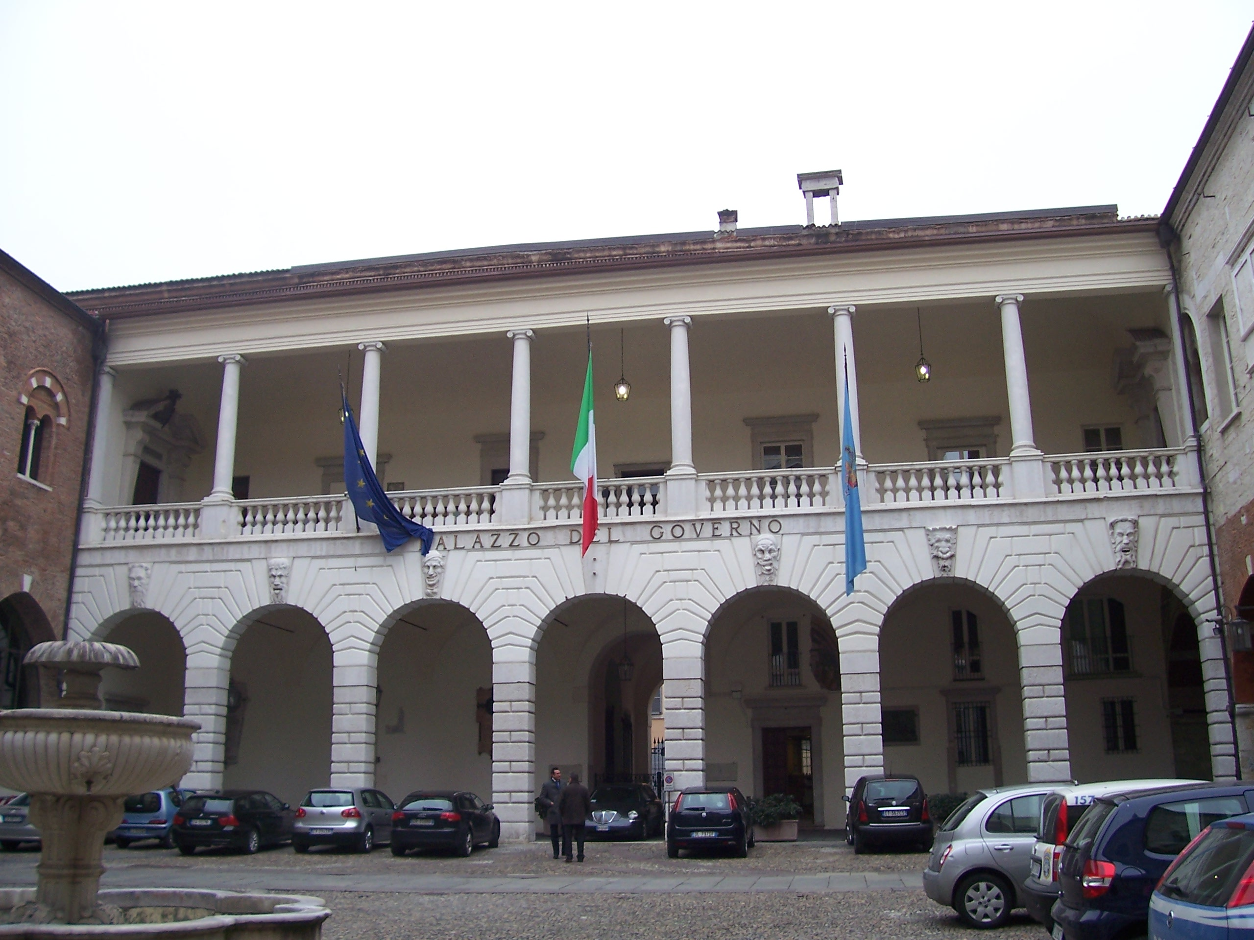 è il lato barocco del cortile del broletto di brescia